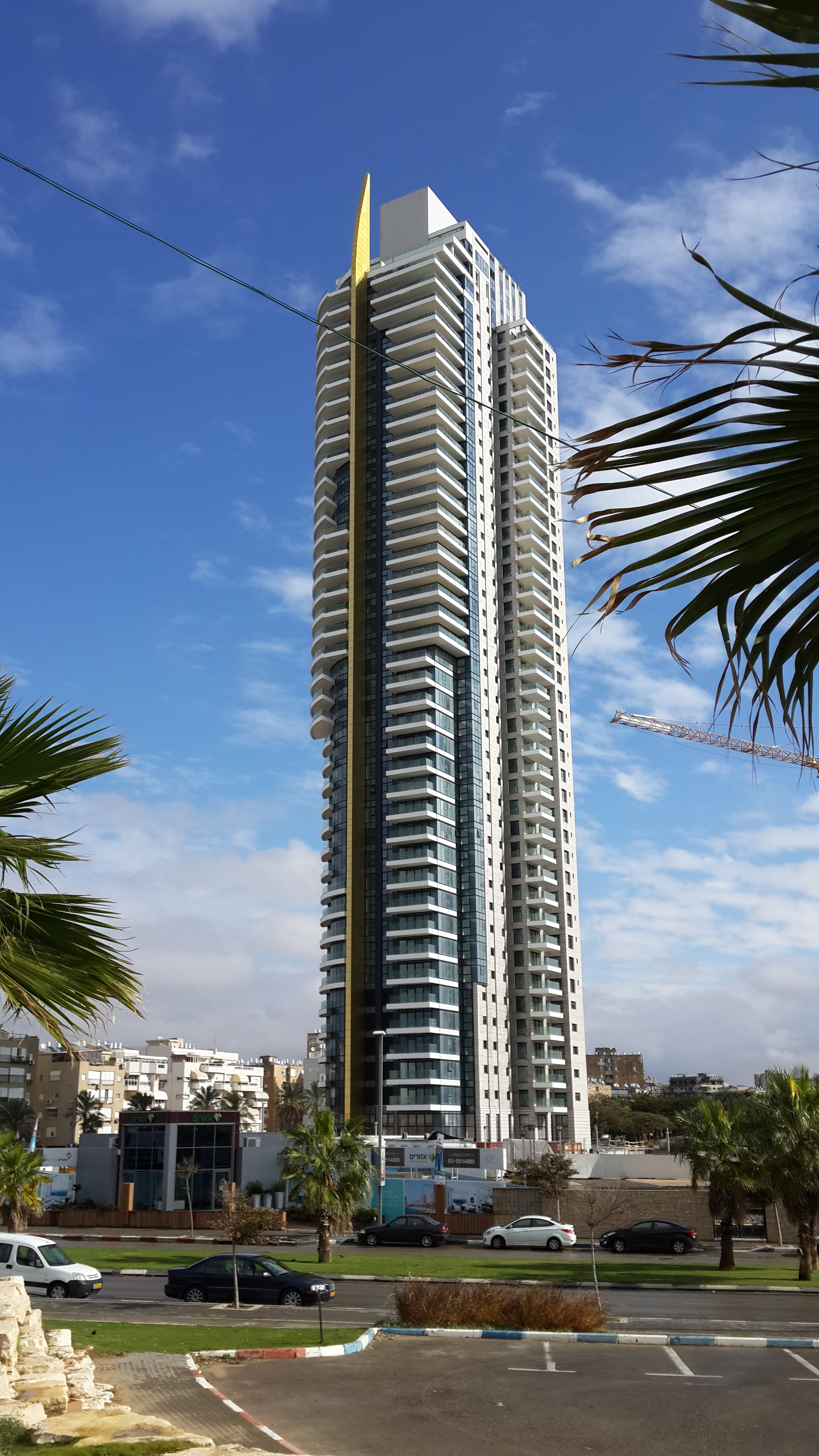 Небоскрёбы Бат-Яма